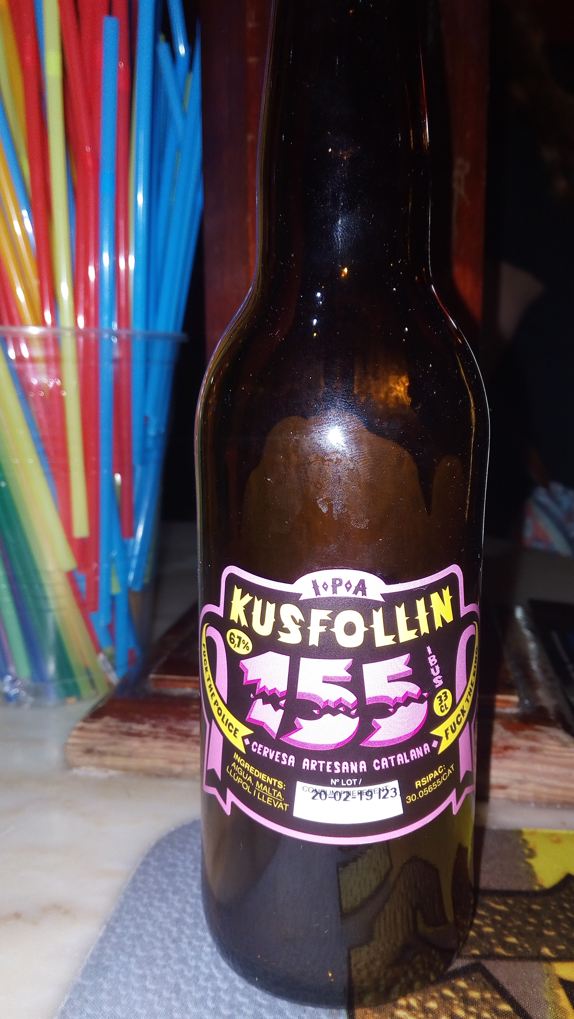 Ipa catalana